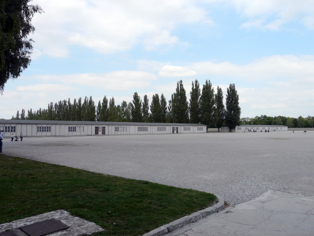 Ehemaliger Apellplatz des Konzentrationslagers Dachau